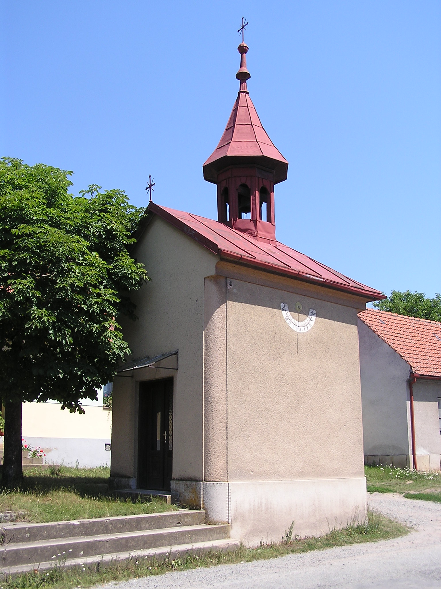 Obec Býkovice - kaple se slunečními hodinami